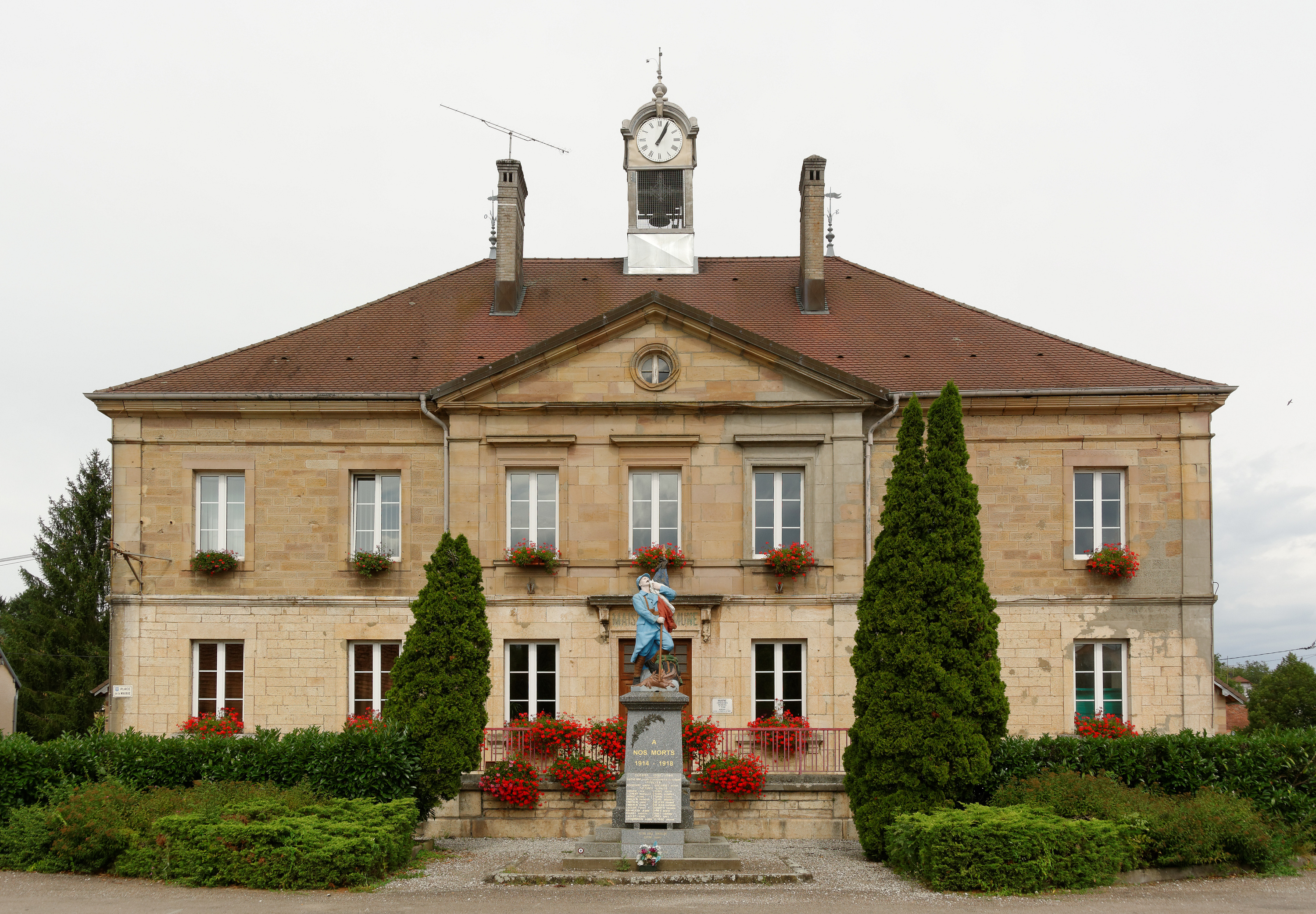 This image was uploaded as part of L'Été des villes 2015. L'ancienne mairie de Saulnot.